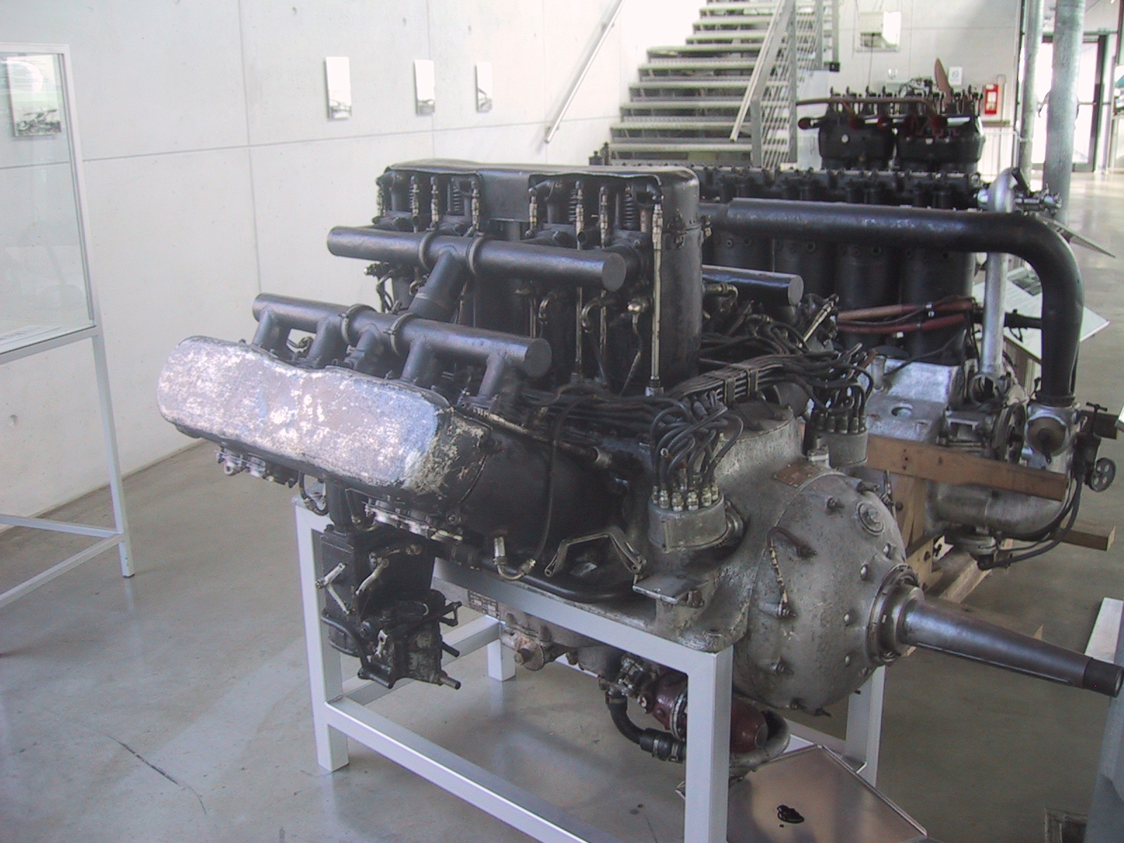 Farman 12 WE Aircraft Engine, Deutches Museum